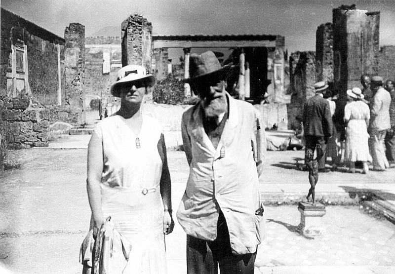 Julia Isbrücker-Dirksen i Odo Bujwid podczas wycieczki do Pompejów. 27. Światowy Kongres Esperantystów w Rzymie, 1935 r.